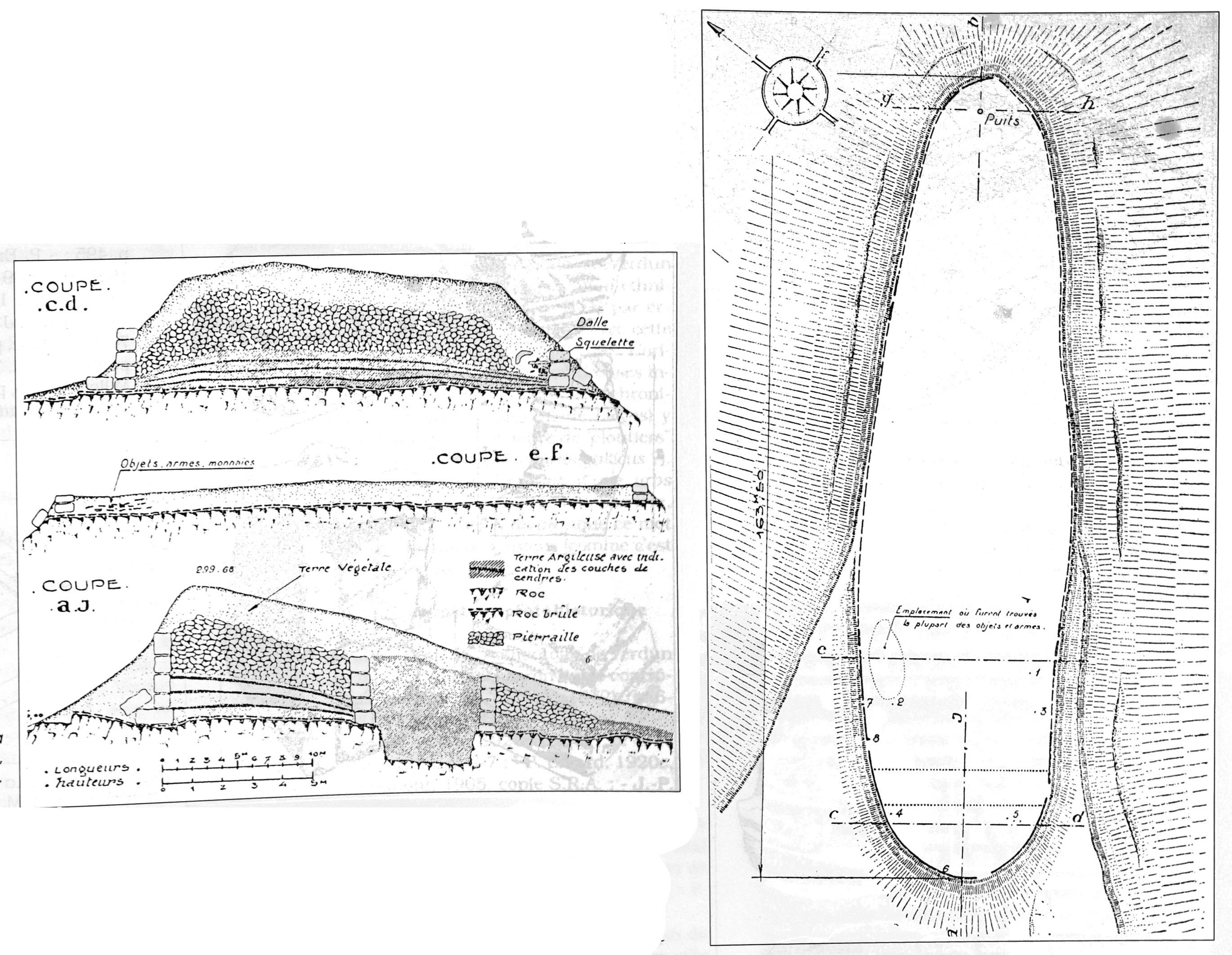 sur une vue ancienne.